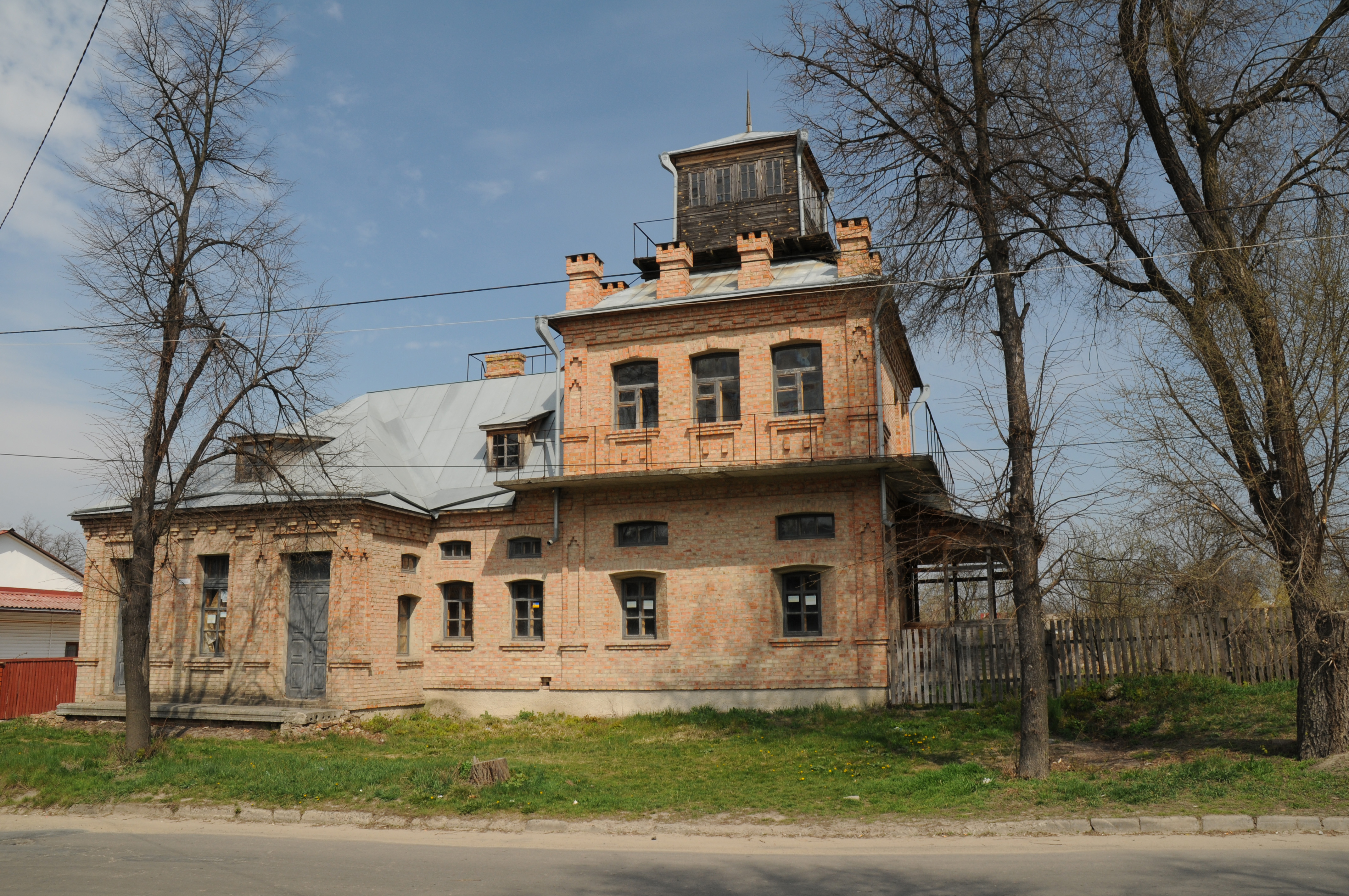 Звенигородка, будинок проф.Агатангела Кримського